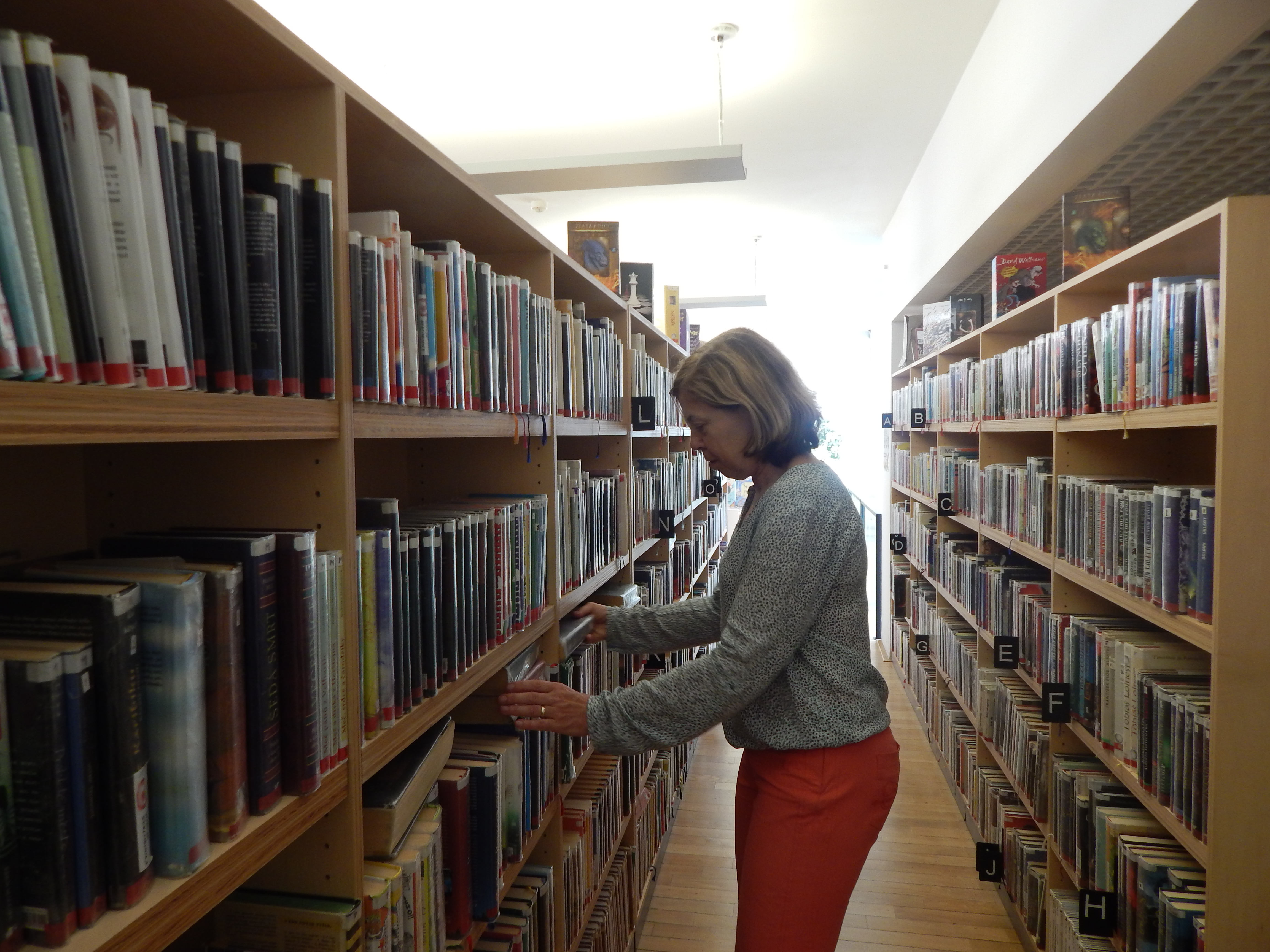 dětské oddělení pro velké čtenáře, Krajská knihovna v Pardubicích